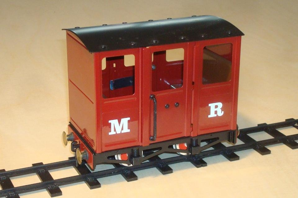 Personenwagen mit der Spur IIe des Englischen Herstellers Mamod für Echtdampf-Modelleisenbahnen. Der Modelleisenbahn-Wagen befindet sich auf Geleisen die vollständig aus Metall sind. Das Heisst die beiden Geleise und die Schwellen sind untereinander elektrisch verbunden.